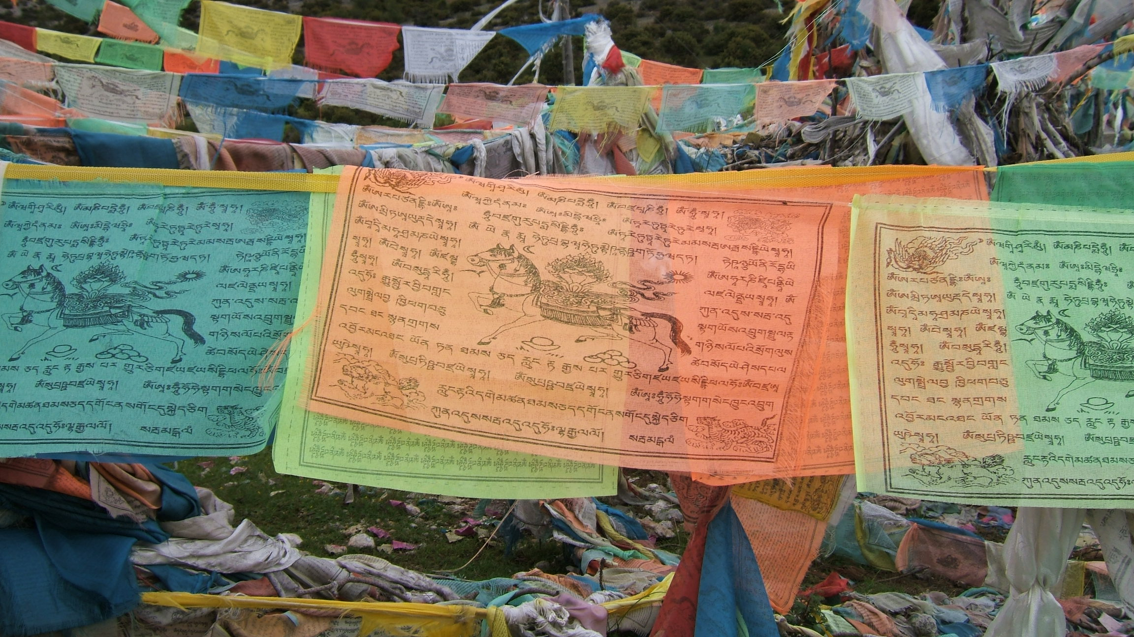 drapeaux de prières Tibétains (loungta)